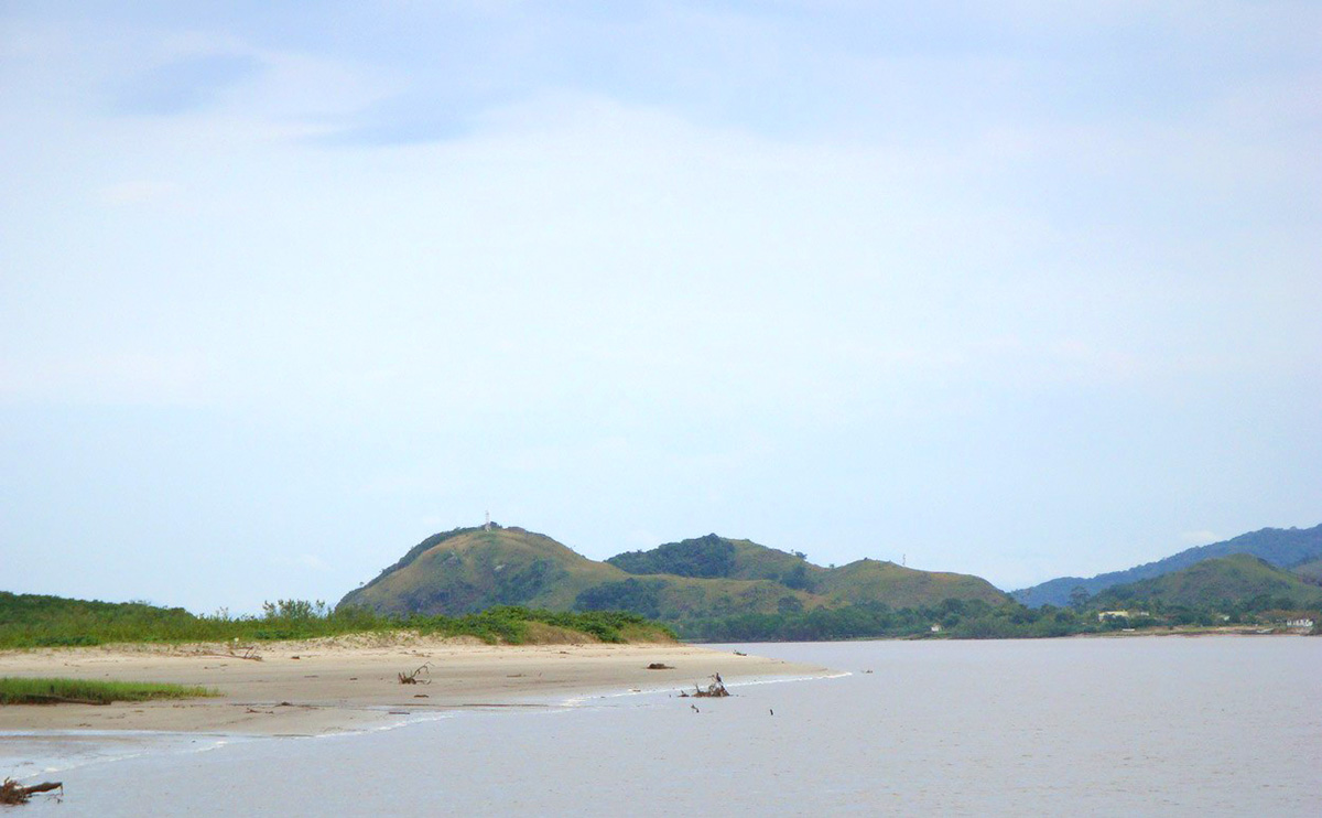 A povoação de Iguape, em 1537, construiu a primeira igreja na Vila de Nossa Senhora das Neves de Iguape (atual bairro Icapara), porém exposta a constantes ataques de piratas, a povoação da vila mudou-se para a paragem conhecido como Cubixativa (atual bairro Enseada), como esse novo local era somente uma faixa de terra, entre o Mar Pequeno e o "Outeiro do Bacharel", no século XVII foi novamente deslocada, para o lugar onde atualmente encontra-se o núcleo urbano da cidade de Iguape, numa Sesmaria cedida pelo donatário Francisco Alvares Marinho.